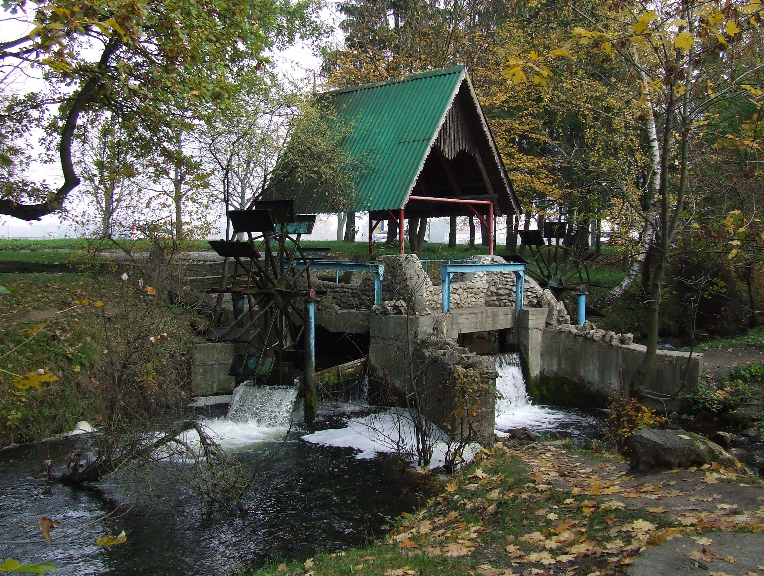 Декоративні водяні млини у тернопільському гідропарку «Топільче».